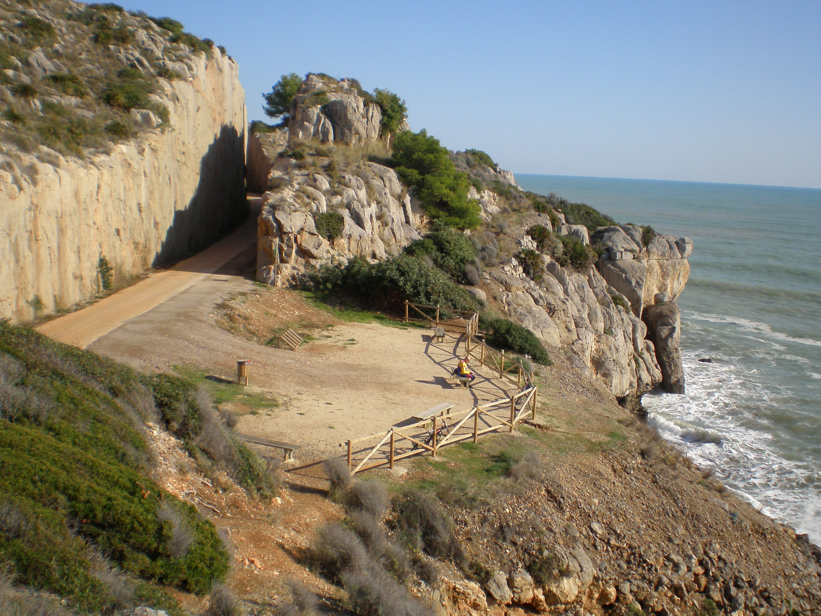 Oropesa del Mar